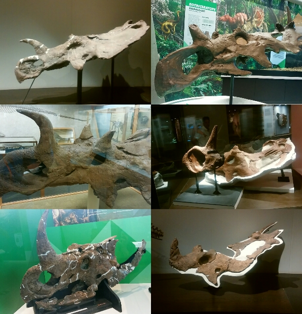 セントロサウルス族